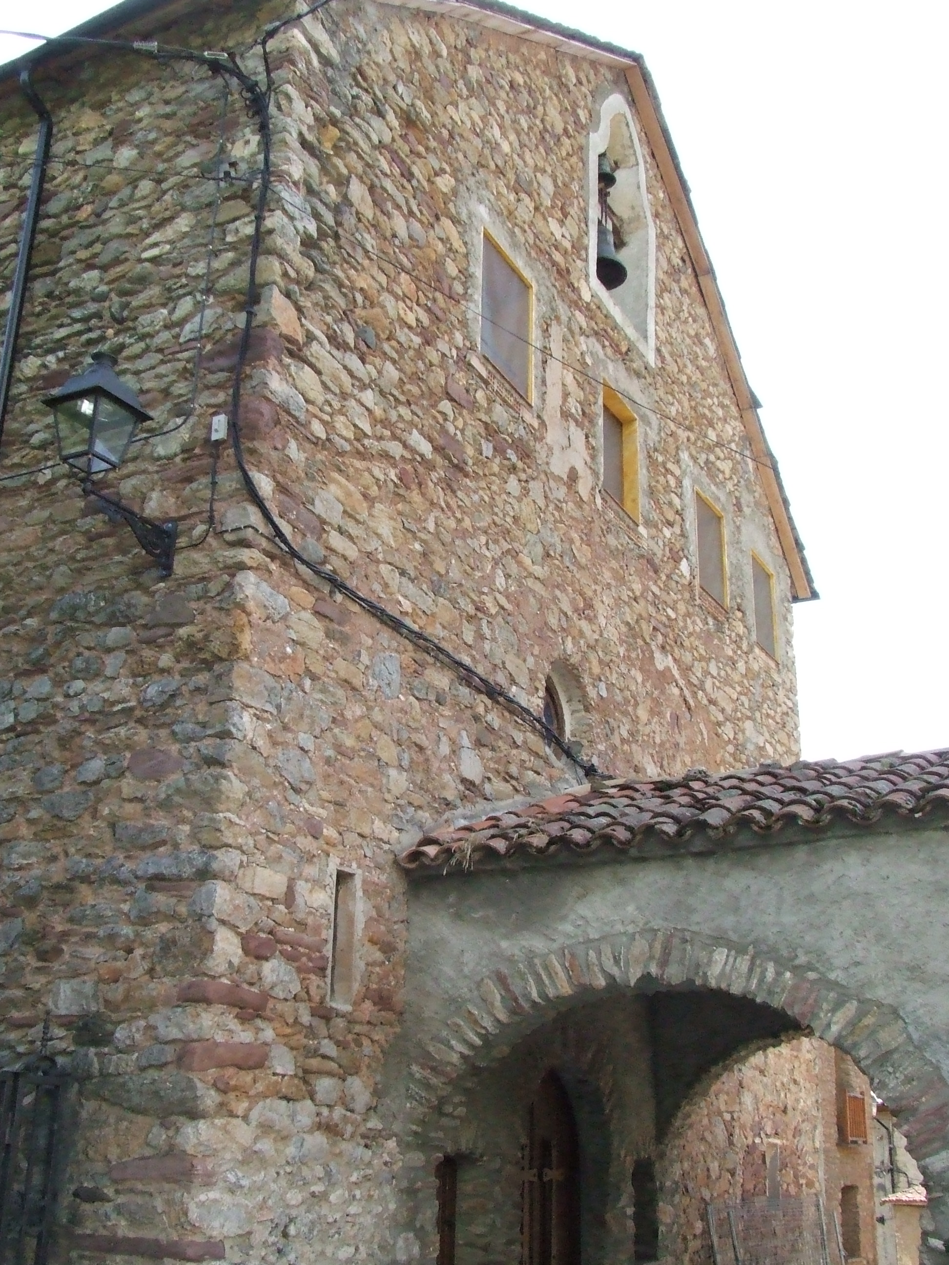 Santuari de la Mare de Déu de la Plana (Mont-ros, la Torre de Cabdella, Pallars Jussà)